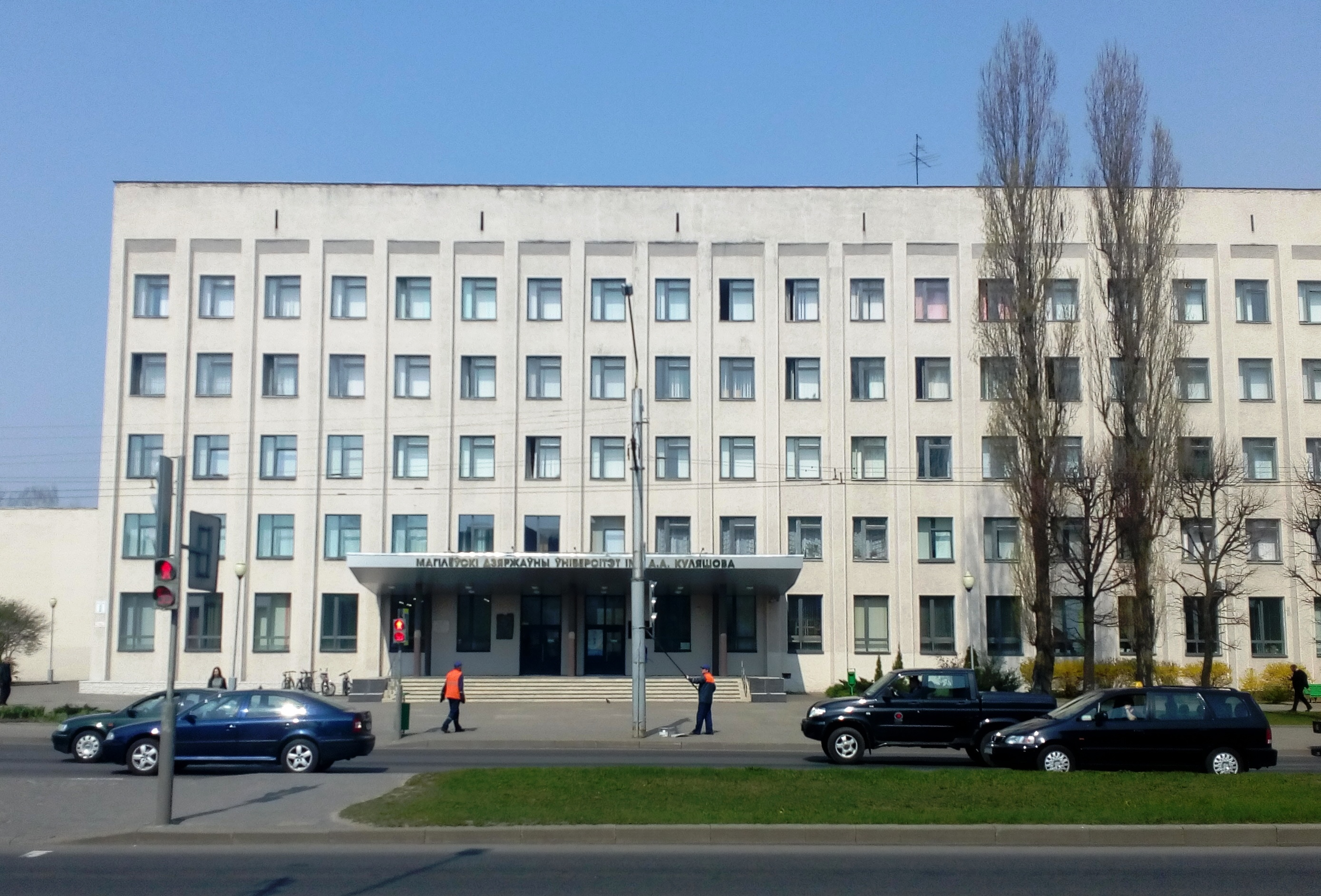 Могилёвский государственный университет имени А.А. Кулешова. Учебный корпус №1